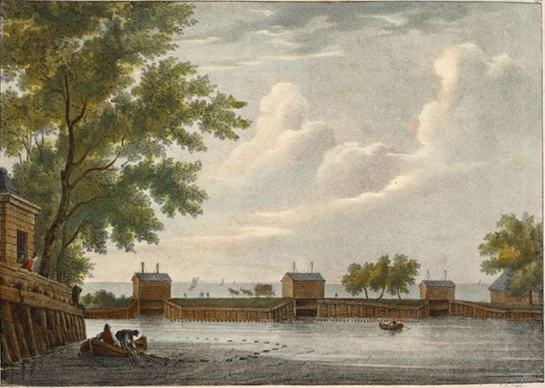 Het Half-Weg